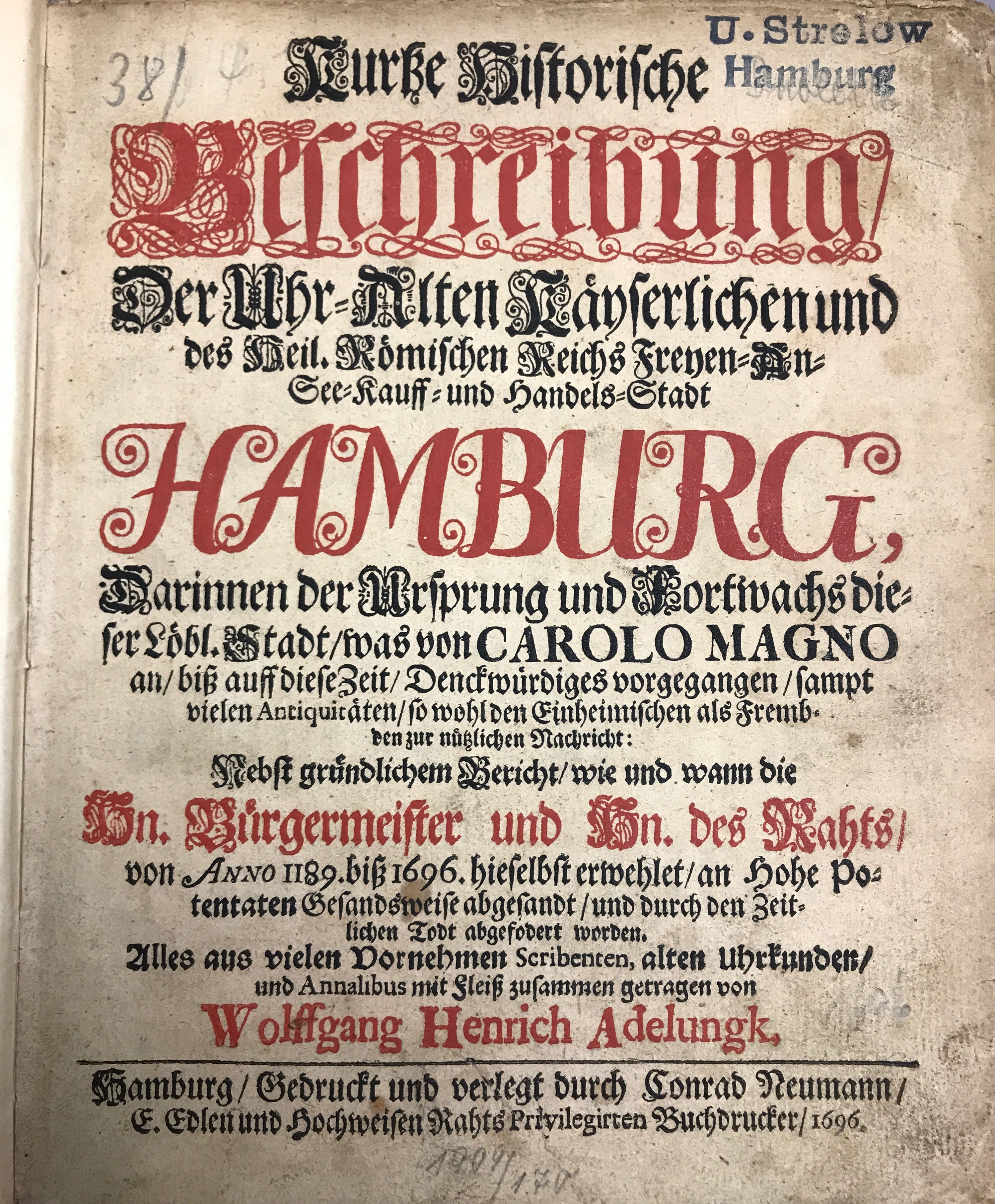 Titelblatt des Adelungk-Werkes "Kurze Historische Beschreibung Der Uhr-Alten Kaeyserlichen und des Heil. Römischen Reichs Freyen- An-See- Kauff- und Handels-Stadt Hamburg". Original-Druck von 1696. Verlegt in Hamburg von Conrad Neumann.